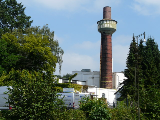 Wegberg - Feinspinnerei (Wegberg - spinning mill)